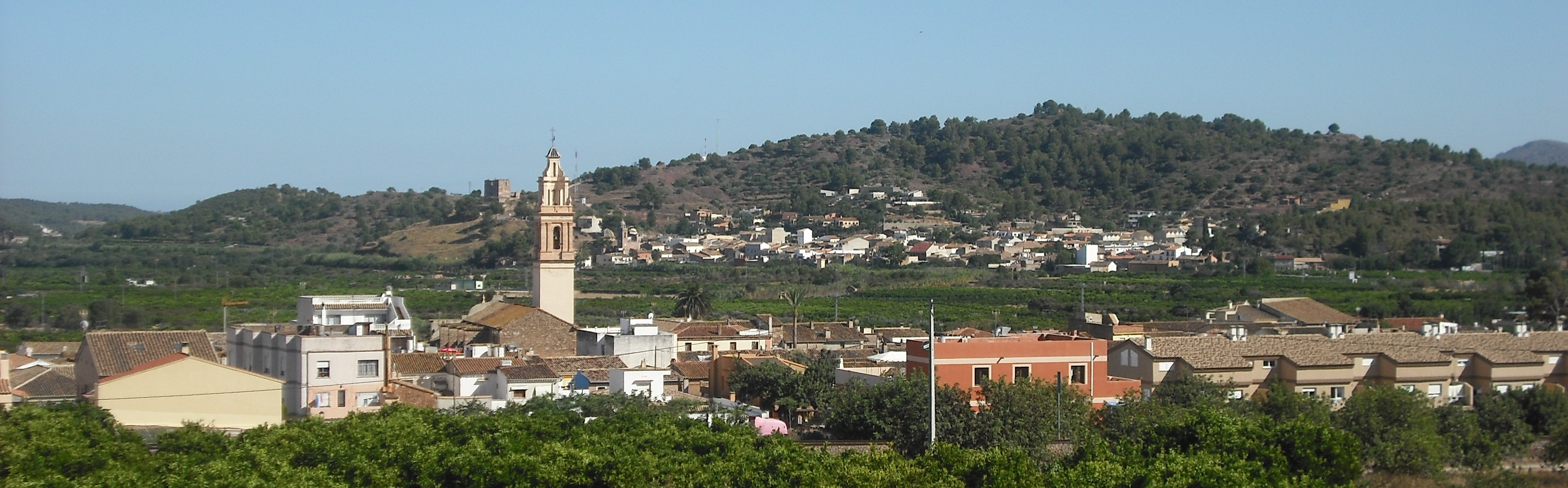 Vista d'Algímia desde la Via Verda d'Ojos Negros.